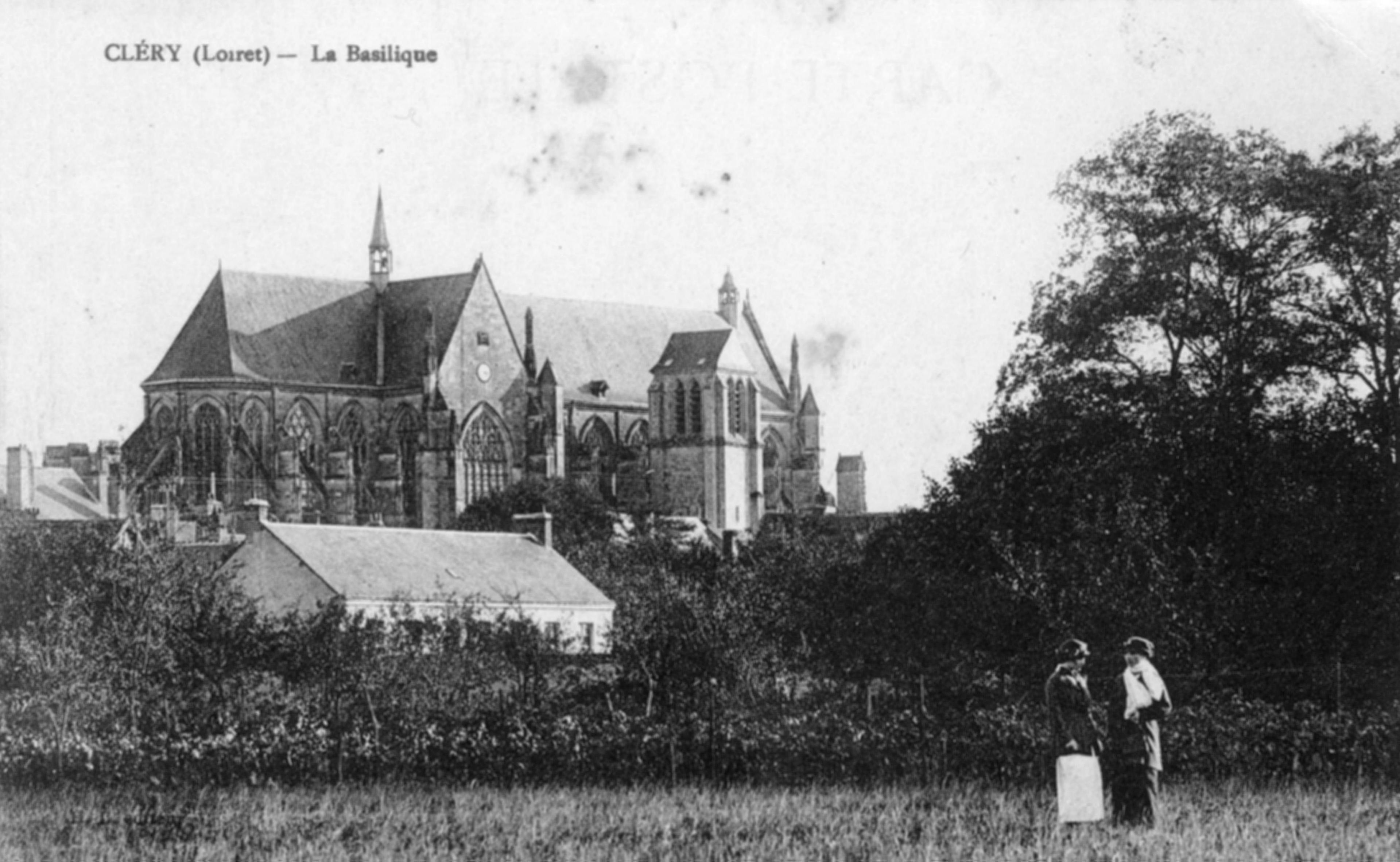 Cléry (Loiret). La Basilique.